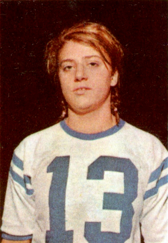 CAMPIONI DELLO SPORT 1967/68-n.339 - MARA SACCHI - NUOTO